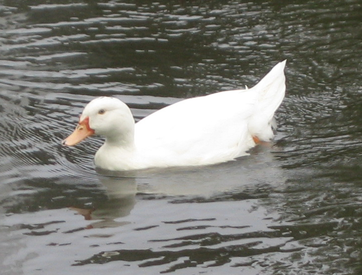 Canard d'Aylesbury , parc Barbieux à Roubaix.